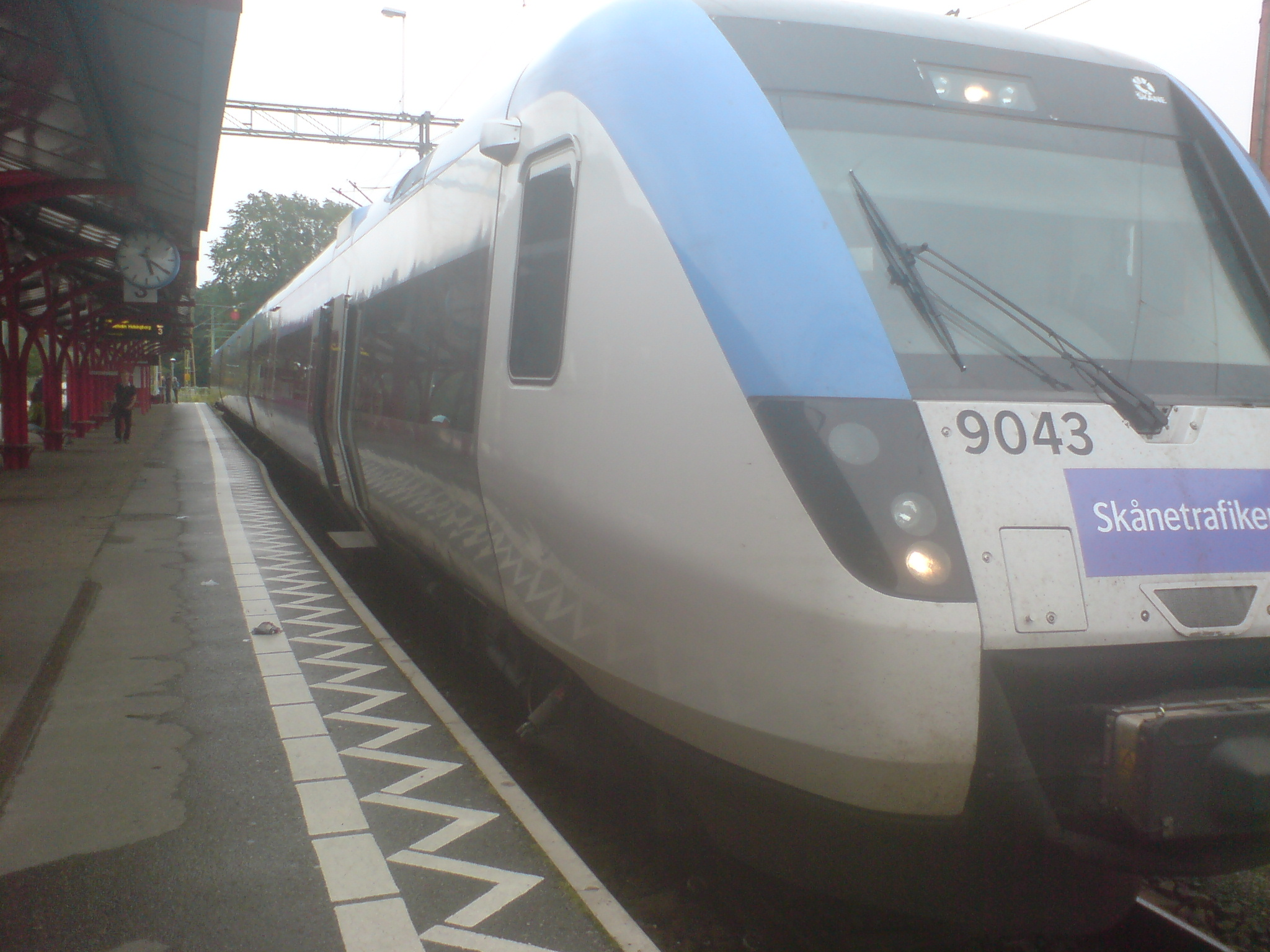 Ett inhyrt regina tåg på Kristianstad Central som ersättning för oridinarie pågatåg den 10 augusti 2008